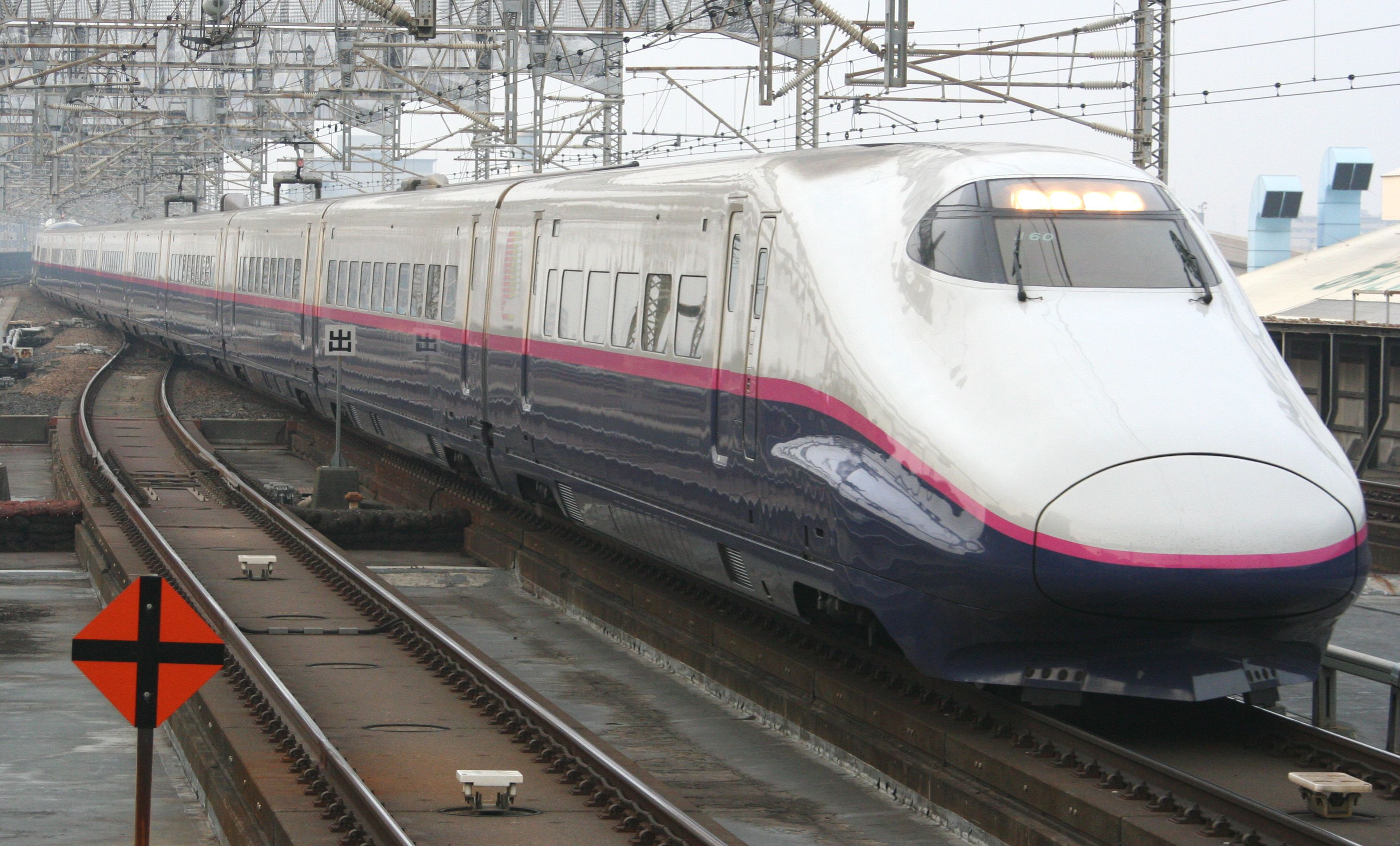 新幹線E2系電車